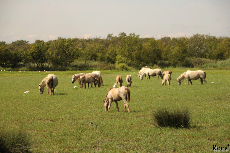 Les juments et leurs poulains de race Camargue pâturent dans les marais des sentiers de la Palunette aux Marais du Vigueirat. (Eté 2013)